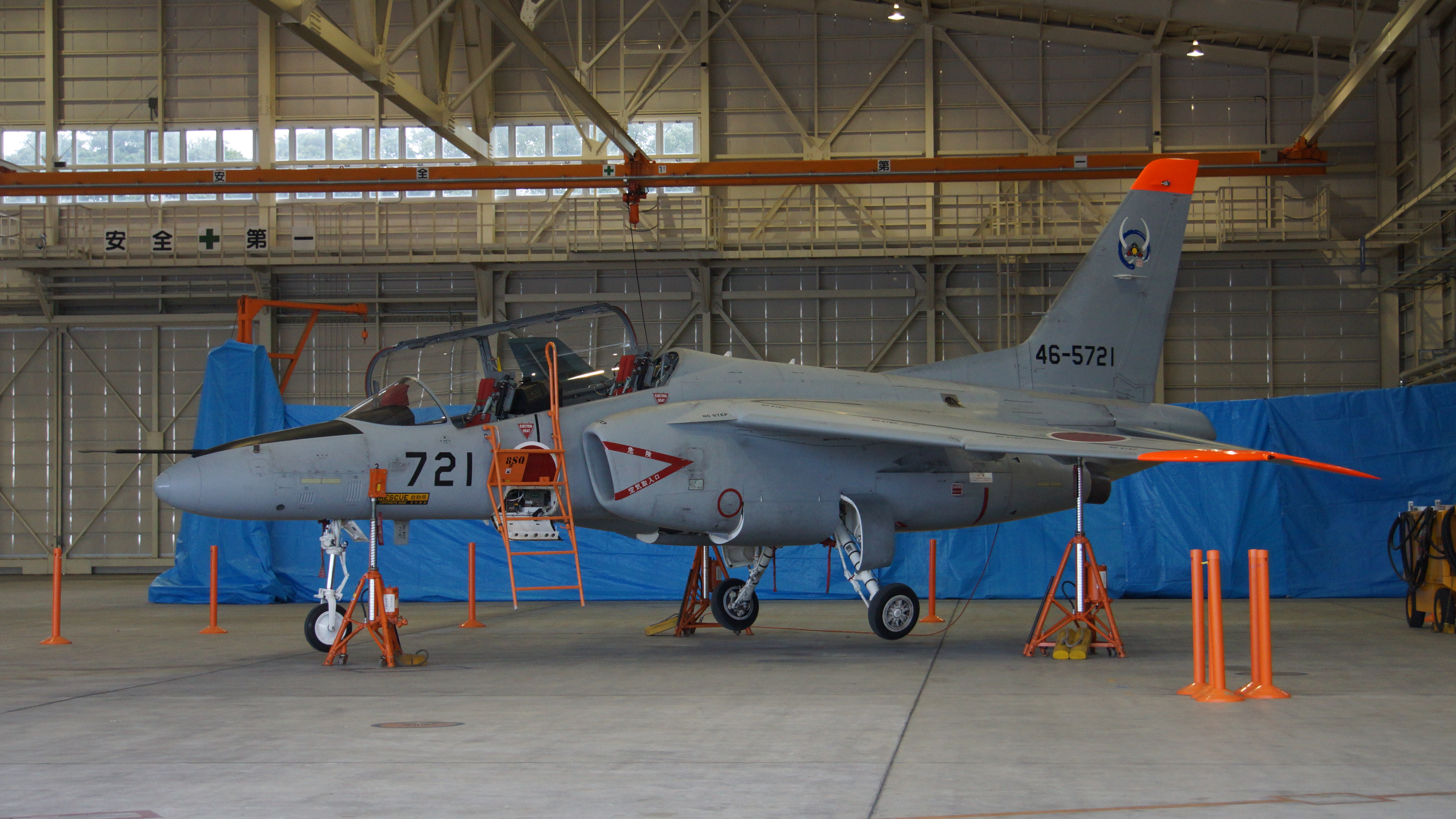 航空自衛隊 T-4練習機（46-5721号機） 左前面。2017年11月26日 築城基地にて。